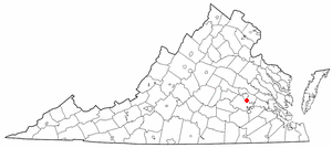 va maps